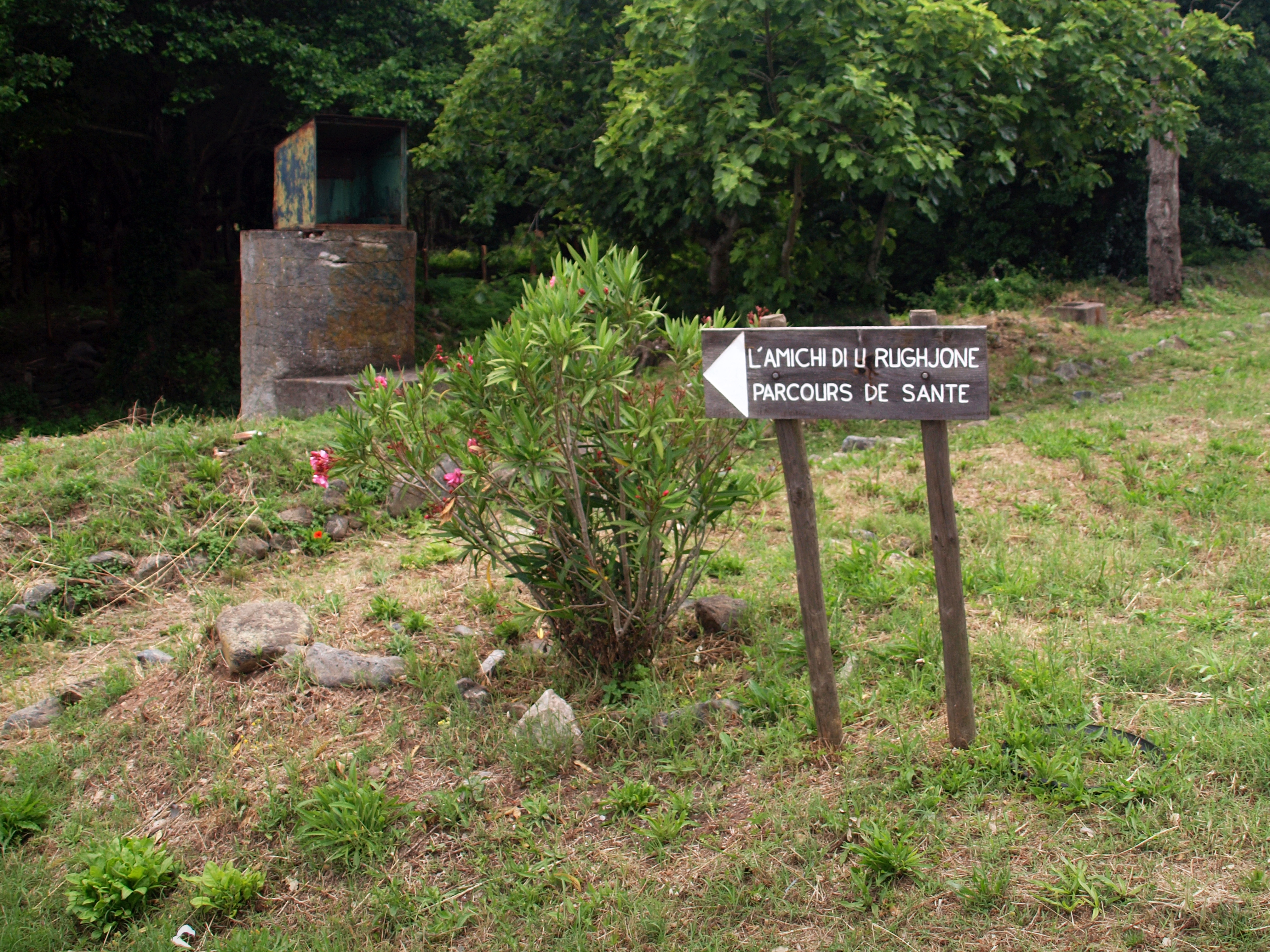 Luri (Corse - Parcours de santé le long des berges du ruisseau de Luri